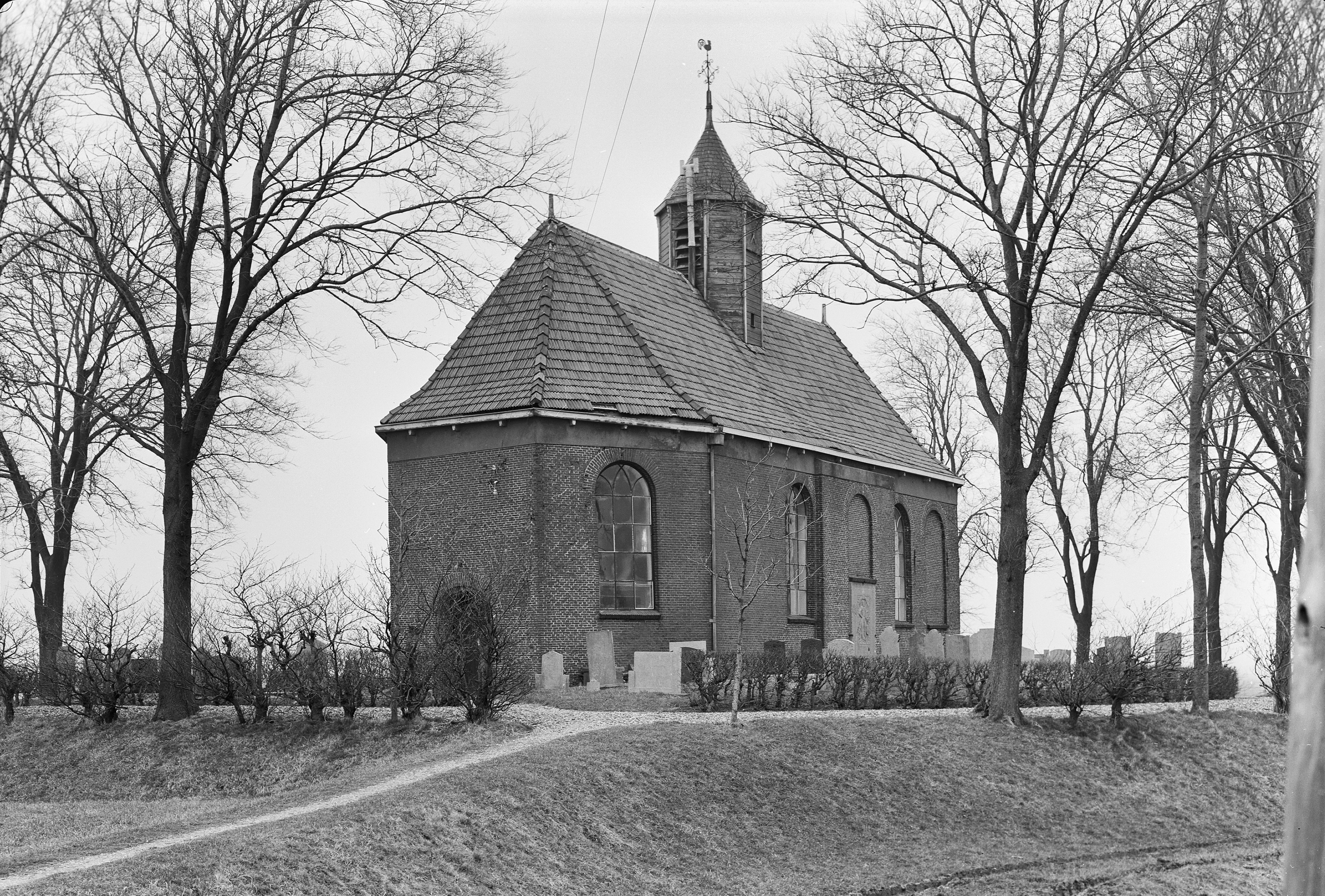 Nederlands Hervormde Kerk: exterieur aanzicht